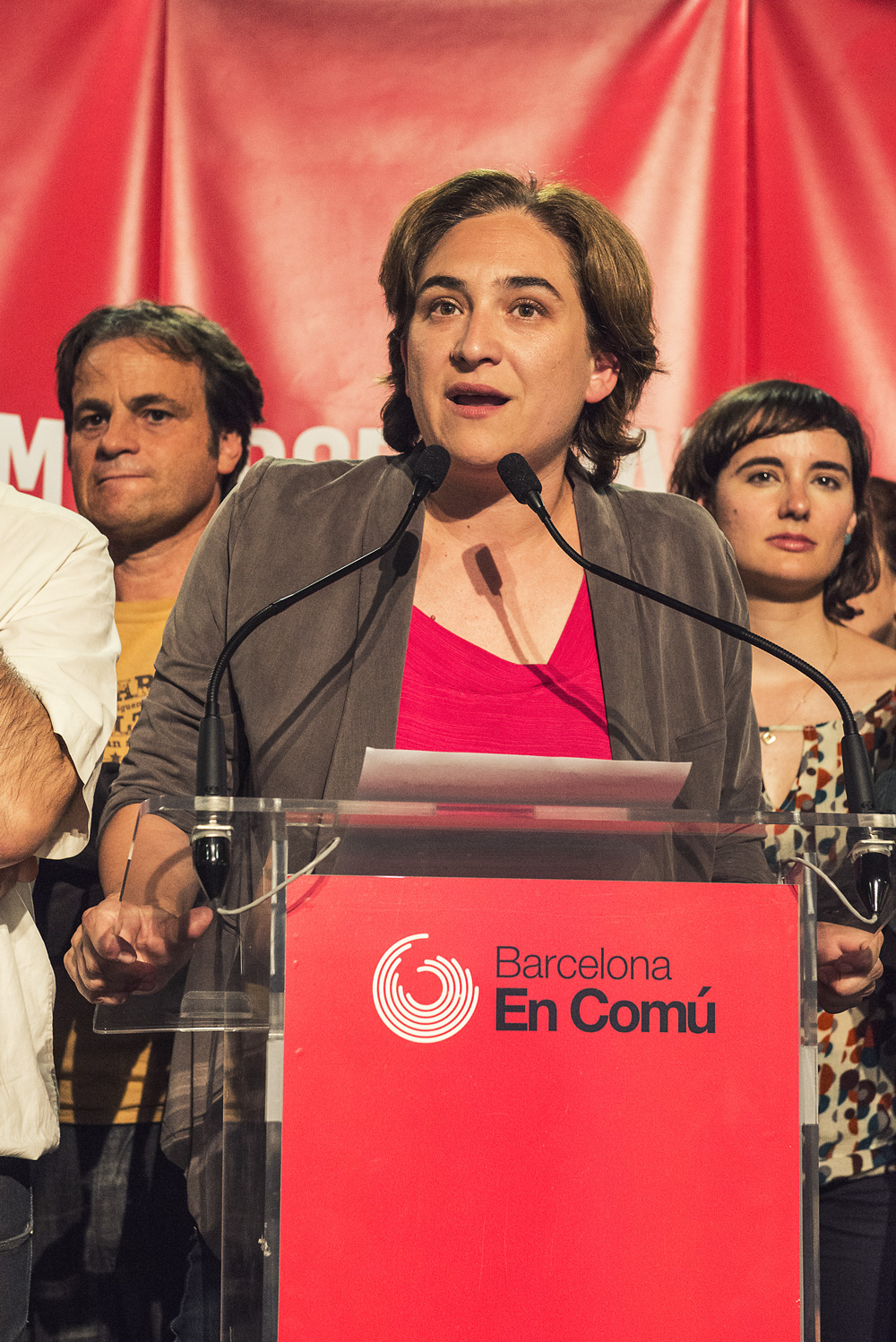 Ada Colau a la nit electoral de Barcelona en Comú.